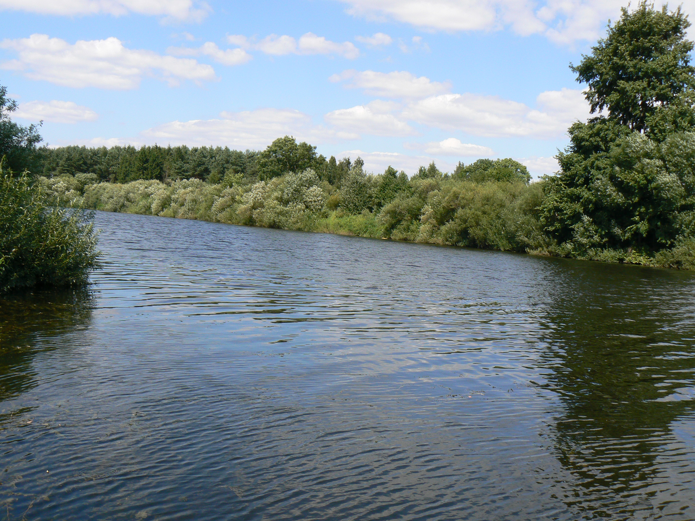 Minija u vsi Daugmantai. Pohled proti proudu, t.j. k severu